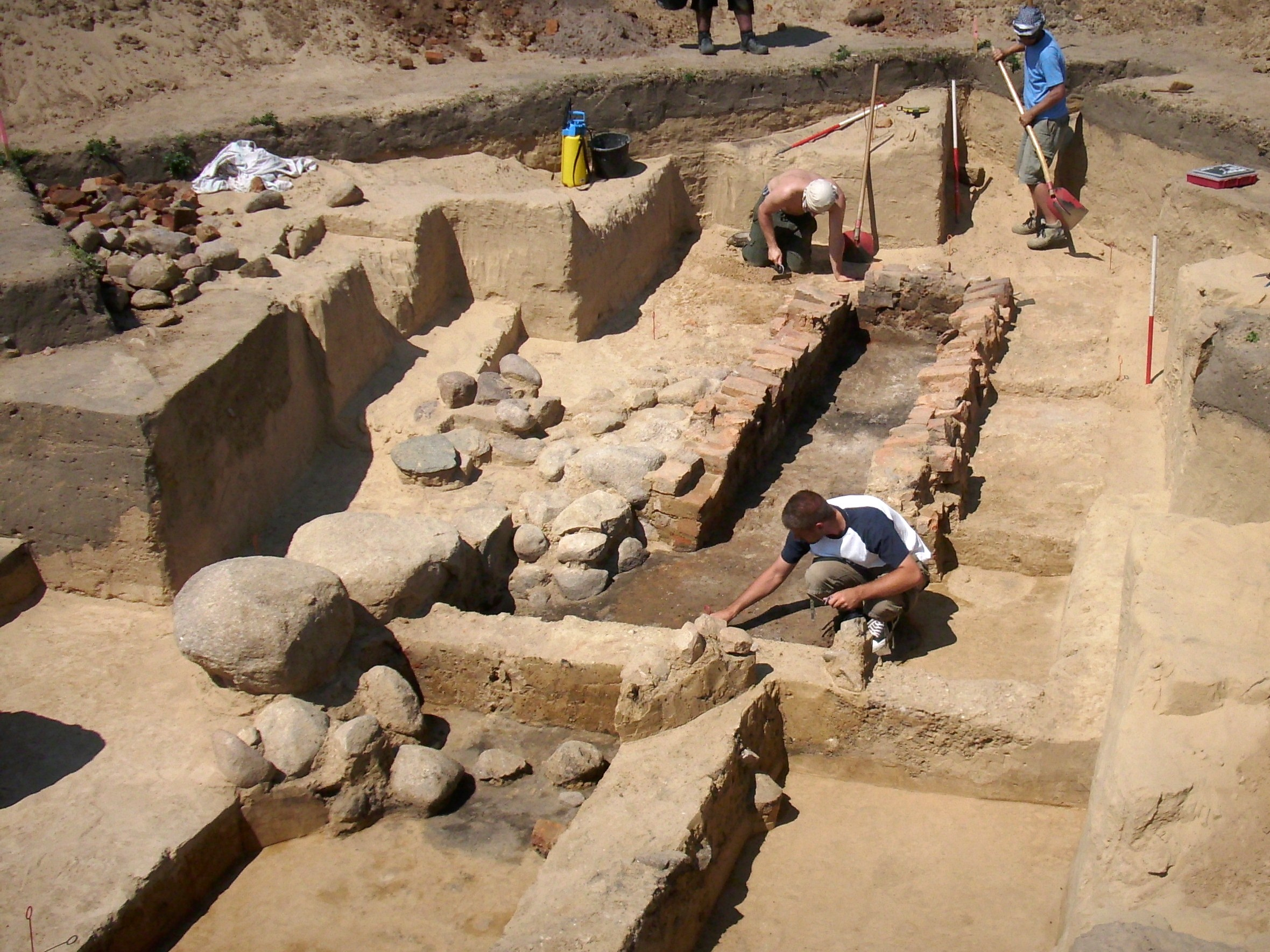 Ausgrabung des Altenhof in Schönerlinde im Mai 2011, Land Brandenburg, Deutschland